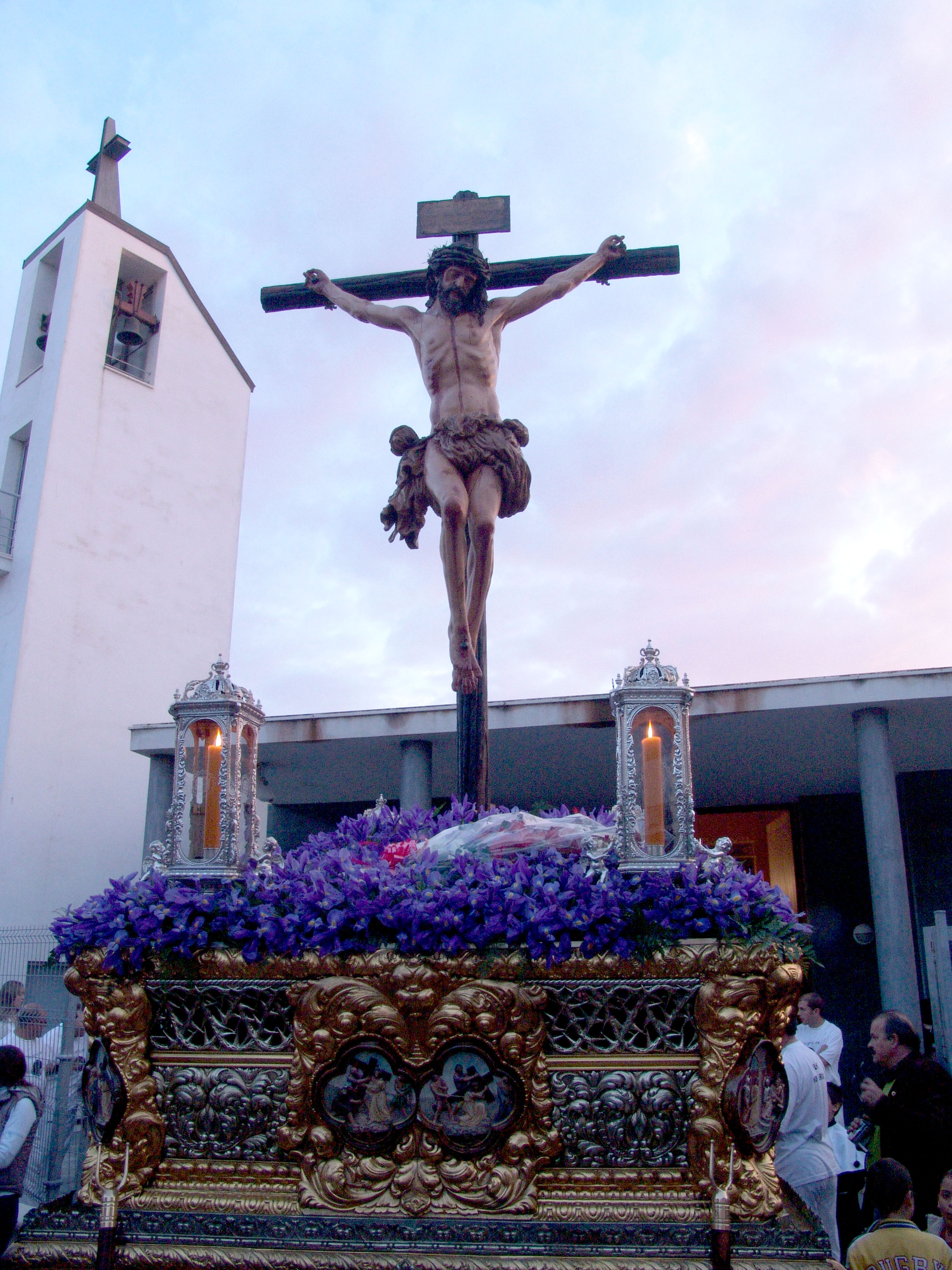 Primera salida del Cristo del Amor.